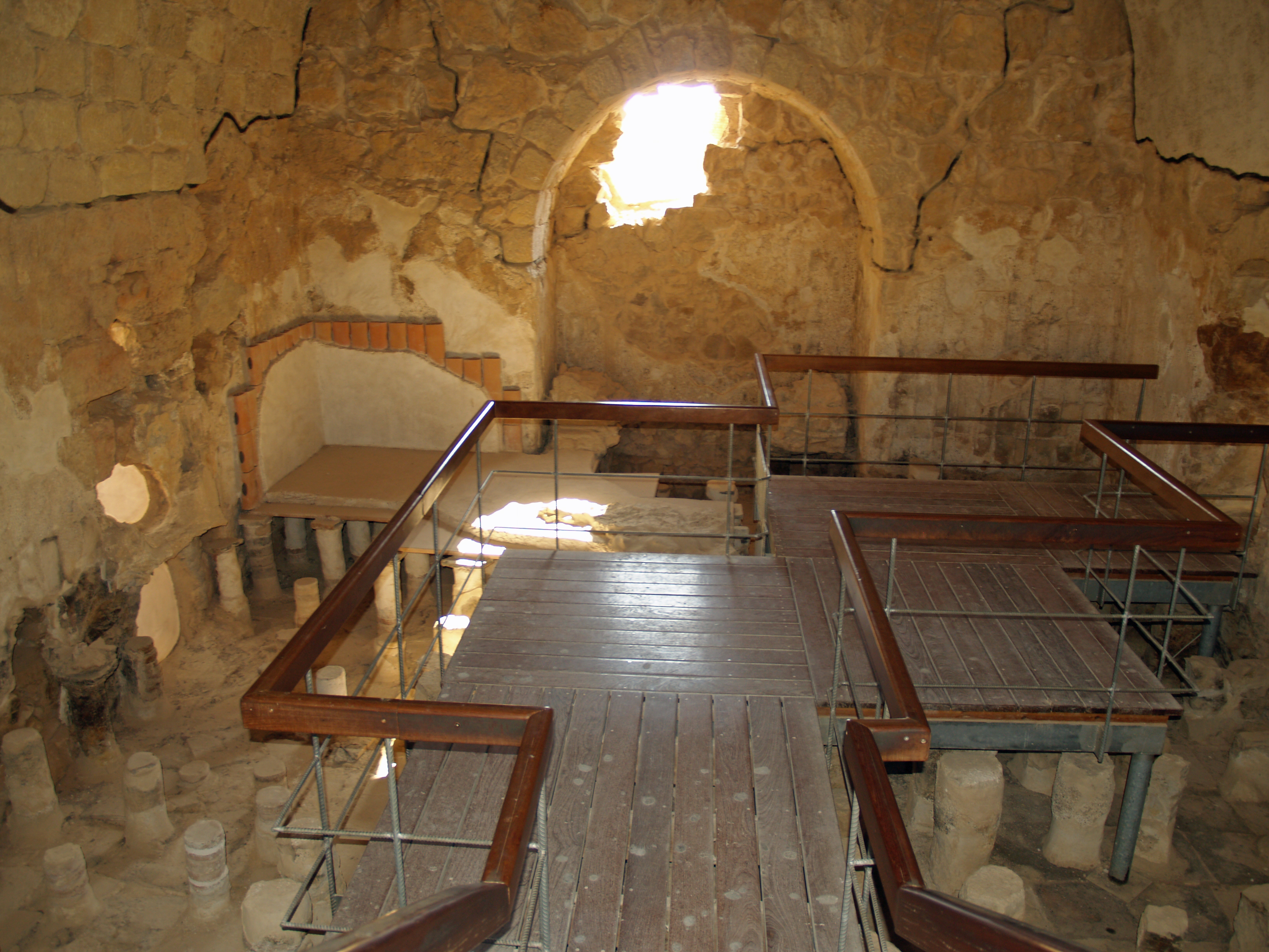 Masada large bathhouse